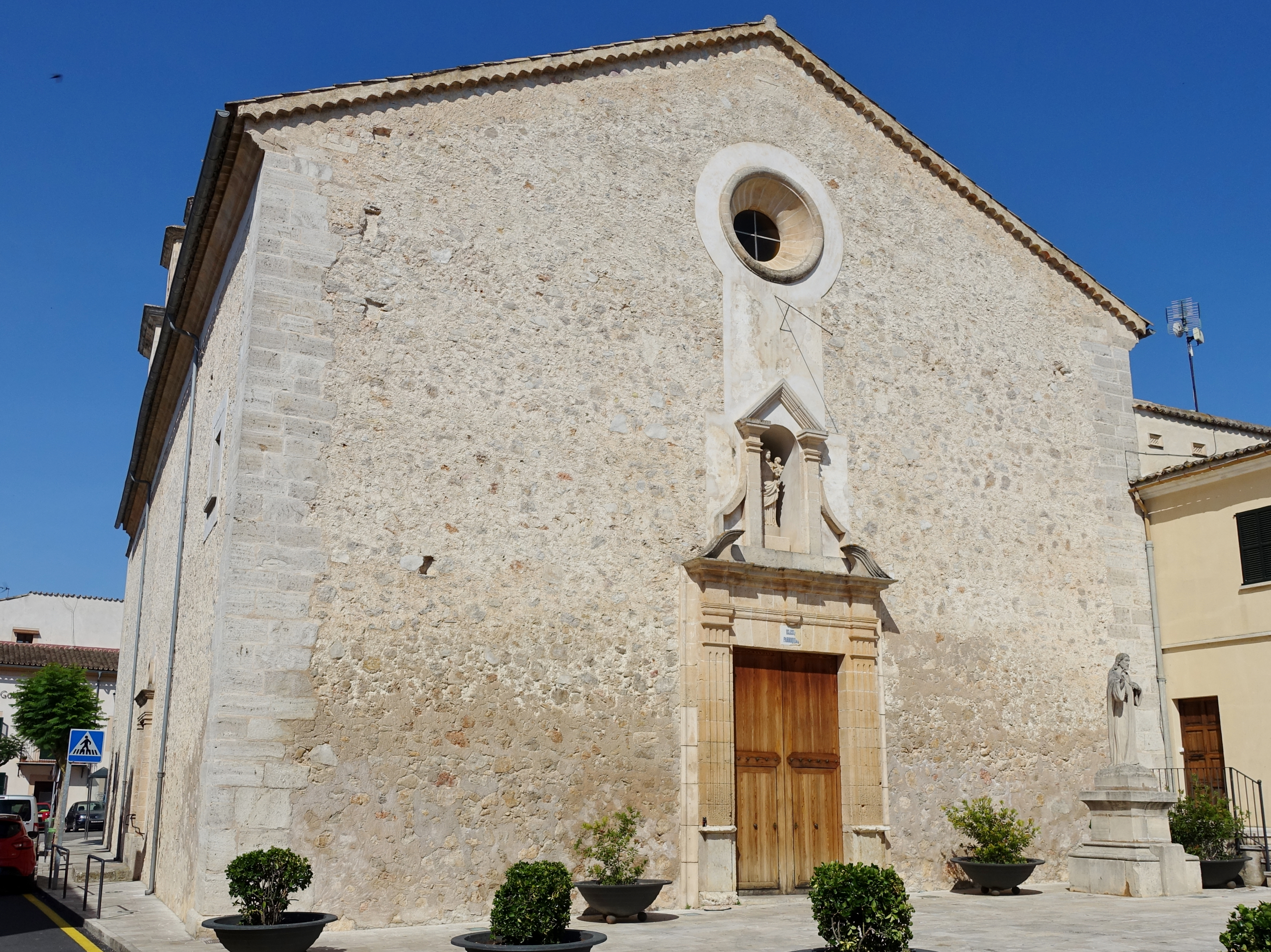 Església La Mare de Déu de Costitx, Kirche von Costitx, Mallorca, Spanien